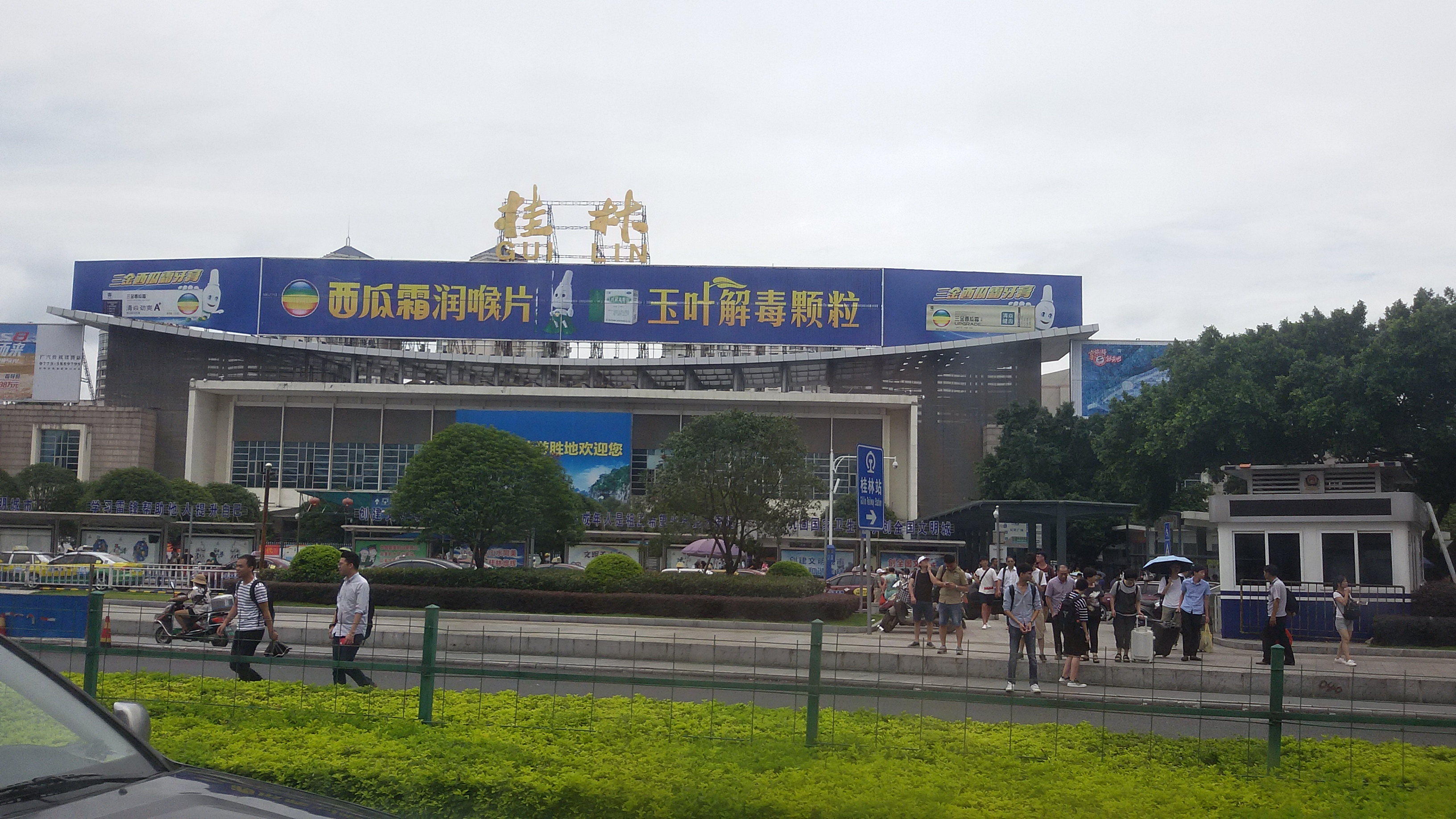 粵語: 桂林火車站